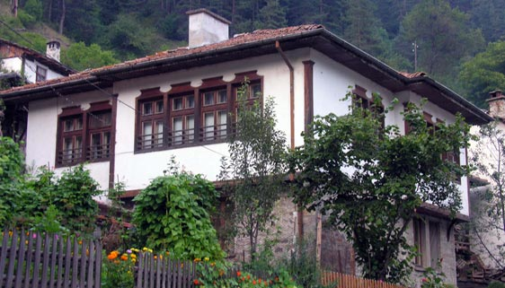 Възрожденски къщи от Широка лъка.